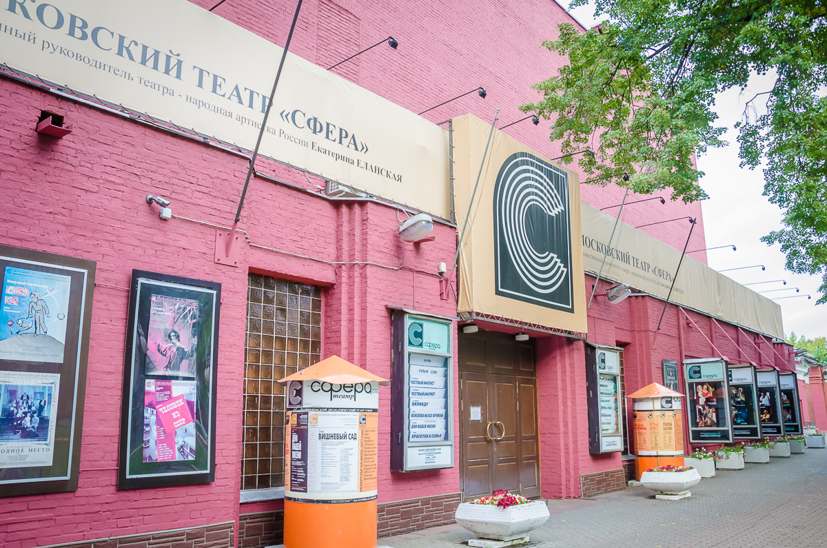 Театр "Сфера"